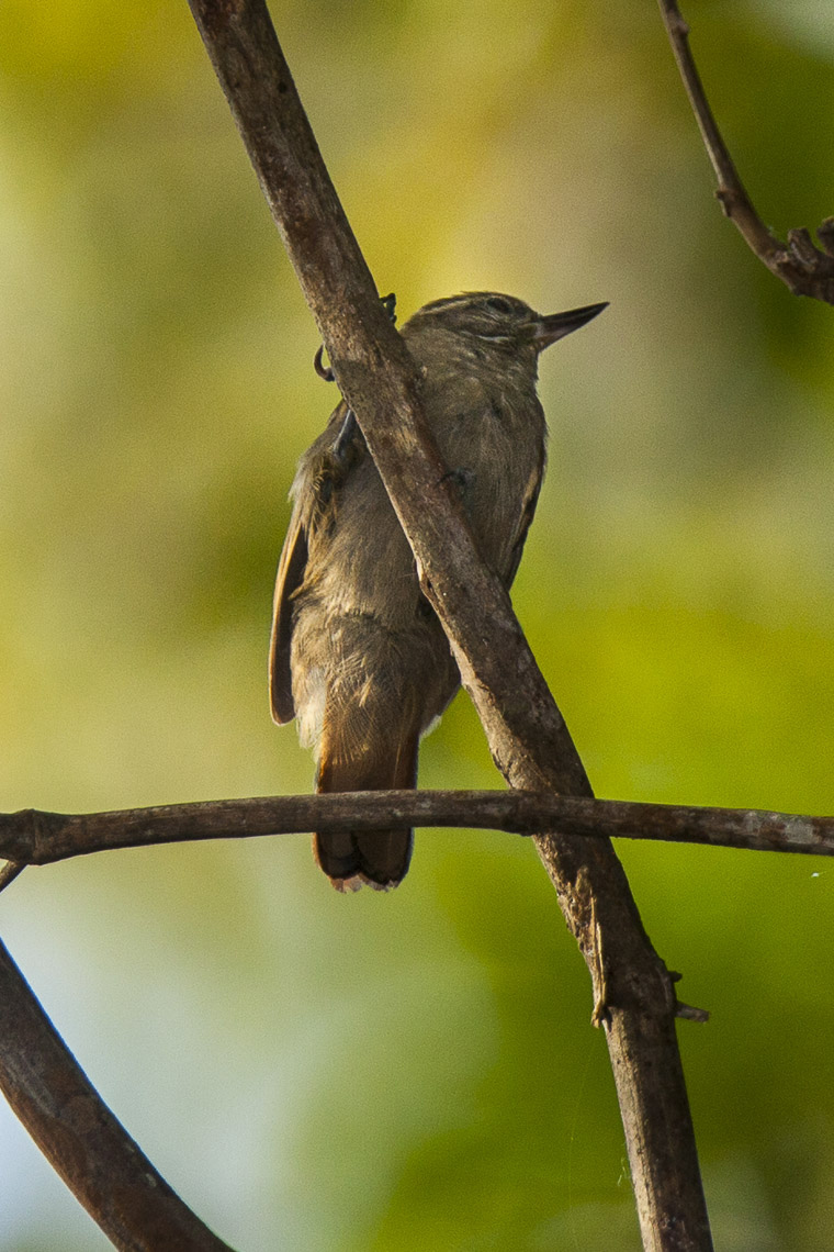 Plain Xenops - Panama_MG_2251